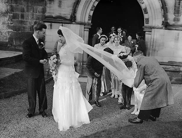 Teitl Cymraeg/Welsh title: Priodas Gwendoline Morris a William O Jones yn Eglwys Plwyf Croesoswallt. Cyfrwng/Medium: Negydd ffilm / Film negative Cyfeiriad/Reference: (gch05526) Rhif cofnod / Record no.: 3367617 Rhagor o wybodaeth am gasgliad Geoff Charles yn Llyfrgell Genedlaethol Cymru More information about the Geoff Charles Collection at the National Library of Wales